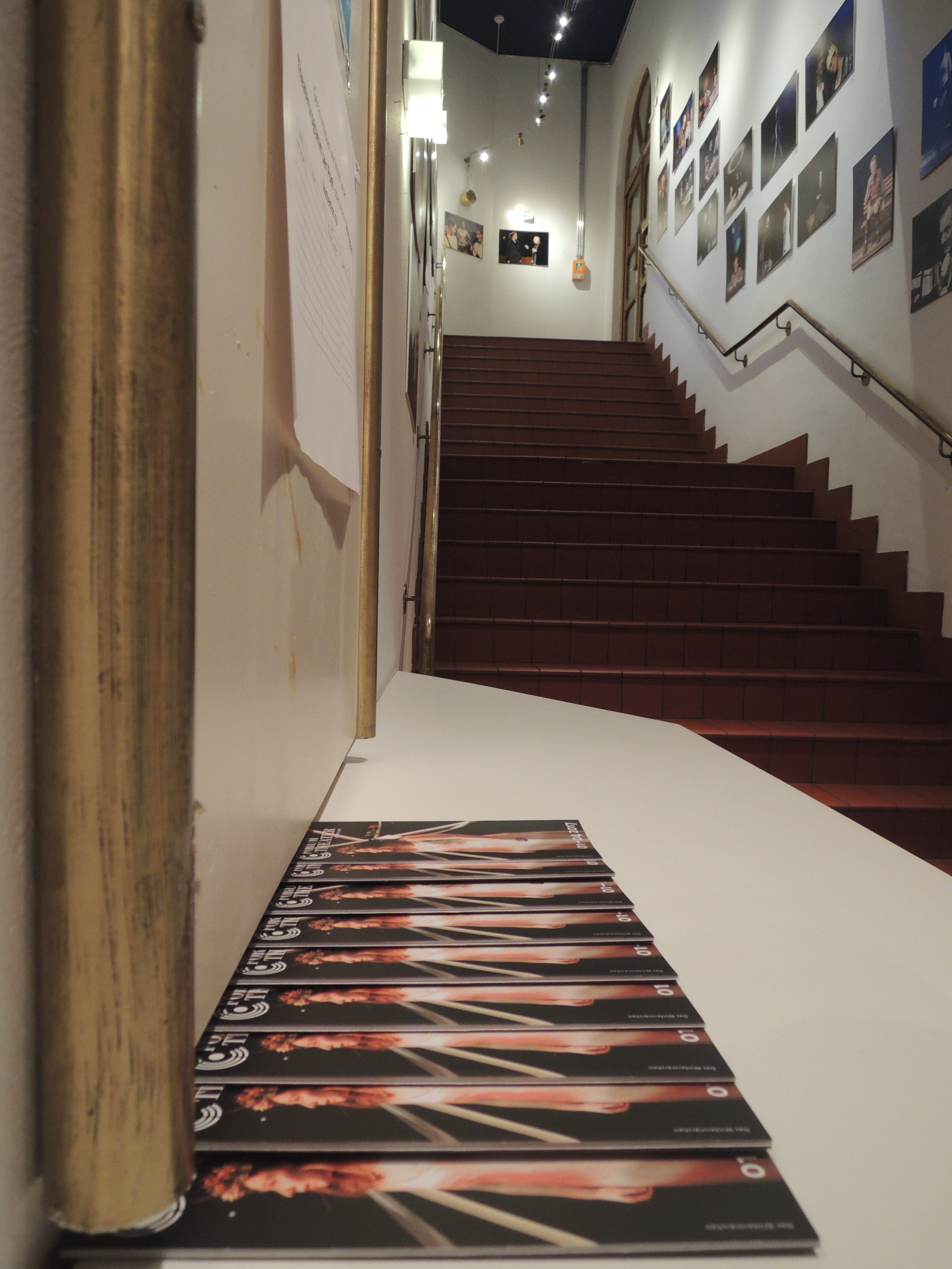 Das Forum Theater Innen